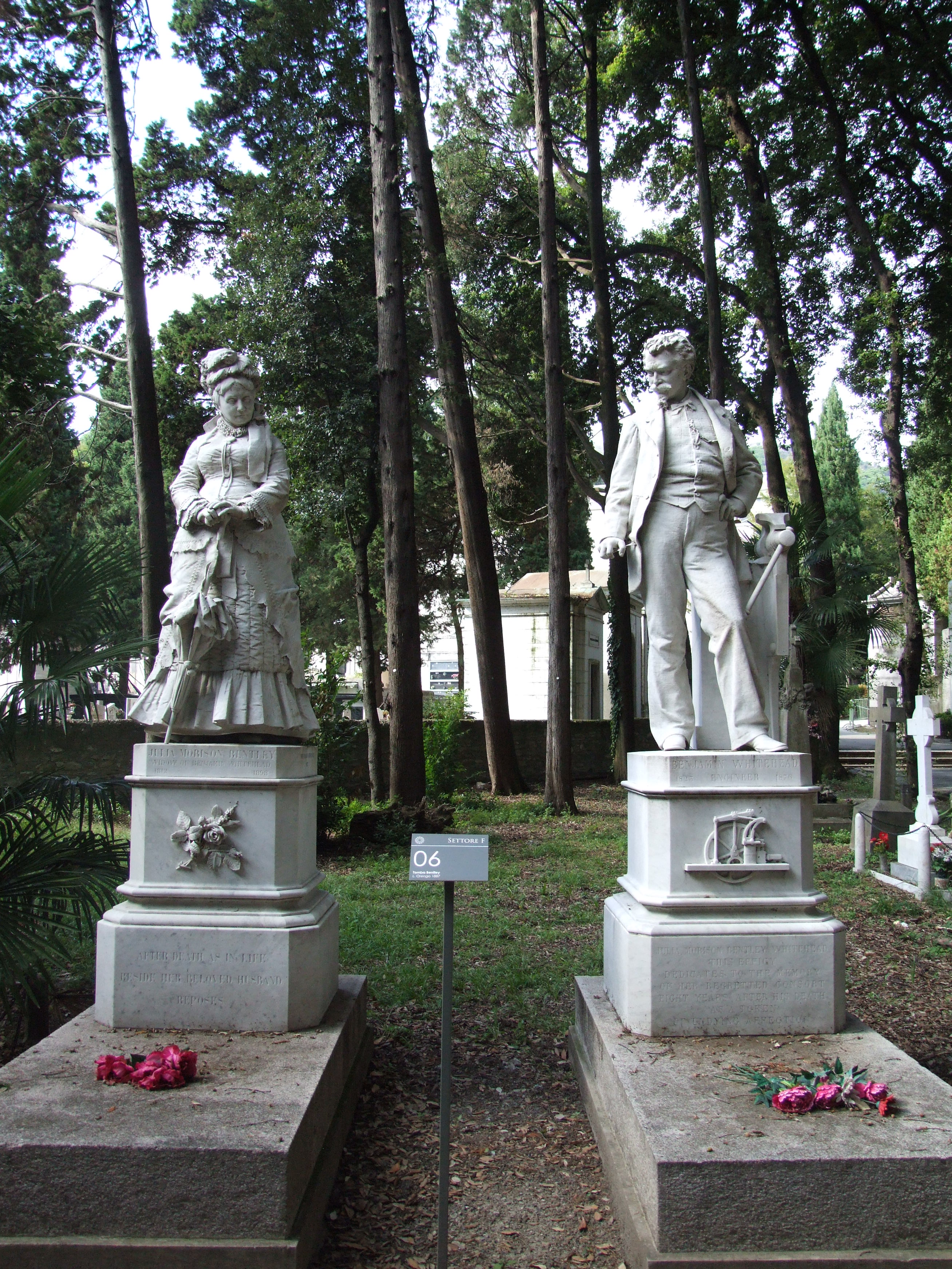 Julia Morison Bentley and Benjamin Whitehead by Lorenzo Orengo, Cimitero di Staglieno This is a photo of a monument which is part of cultural heritage of Italy.